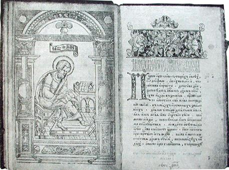 Разворот Львовского Апостола 1574 года, первой печатной книги на Украине